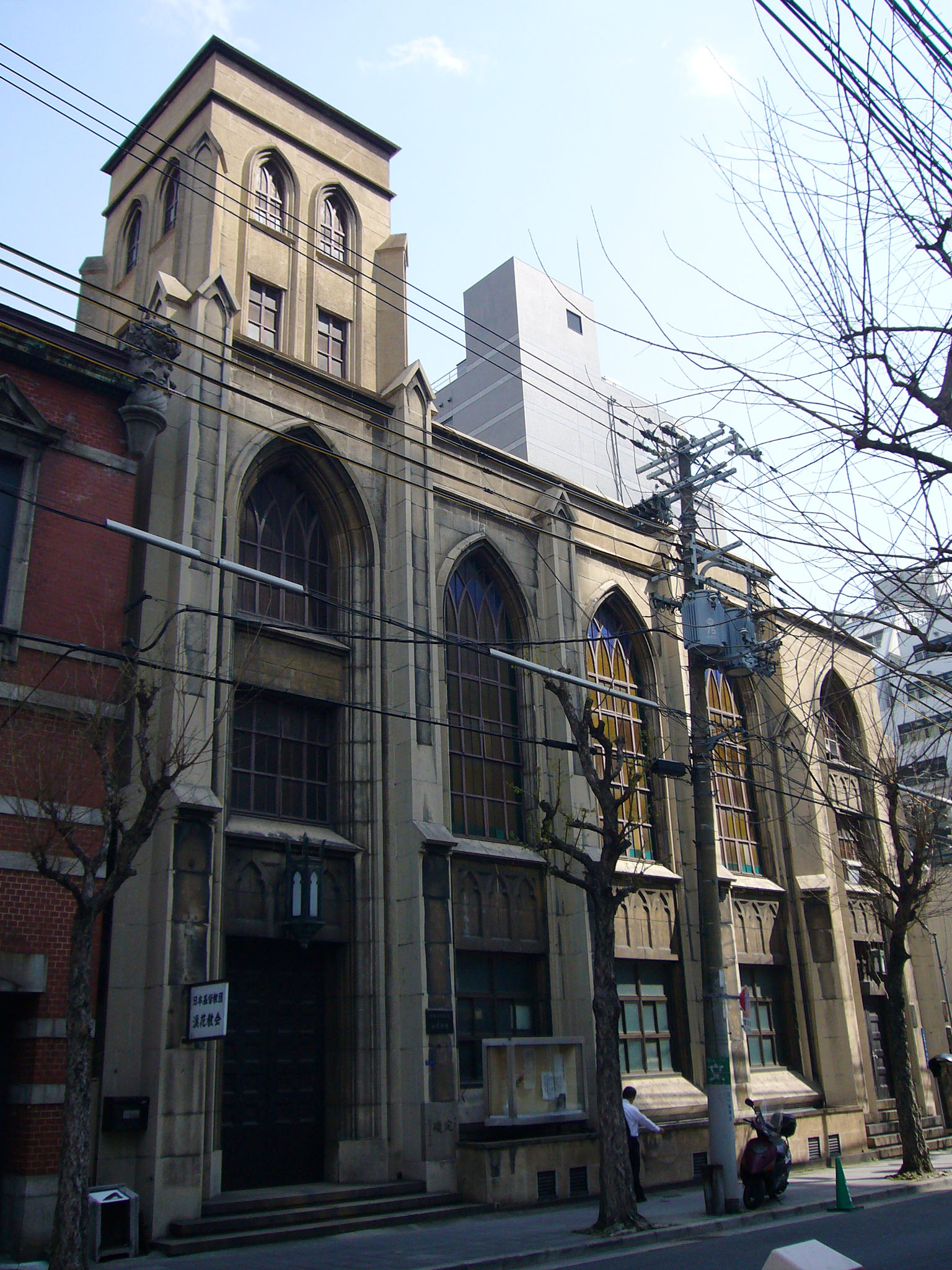 UCCJ Naniwa Church in Osaka, Japan